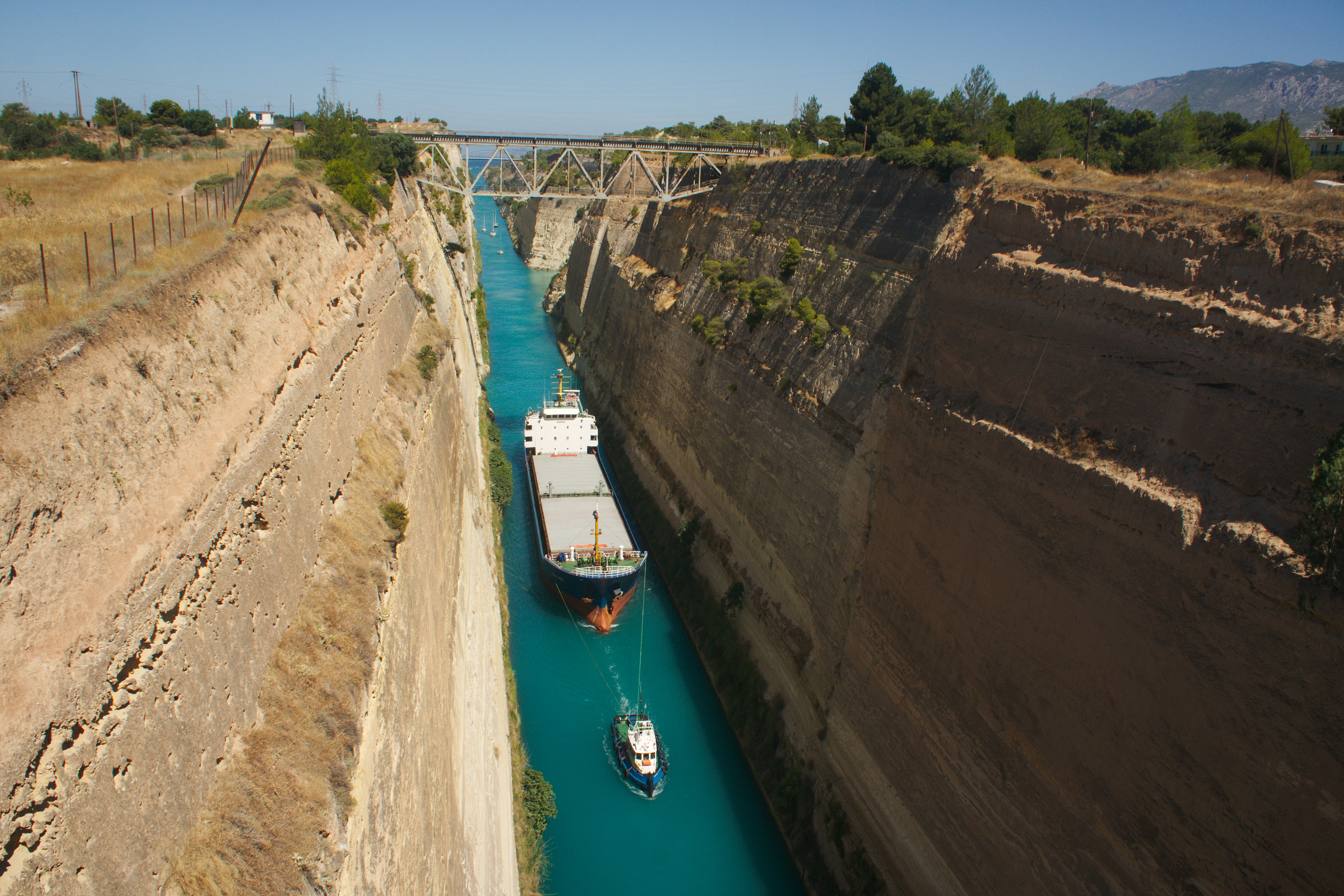 Navire imposant traversant le canal de Corinthe.